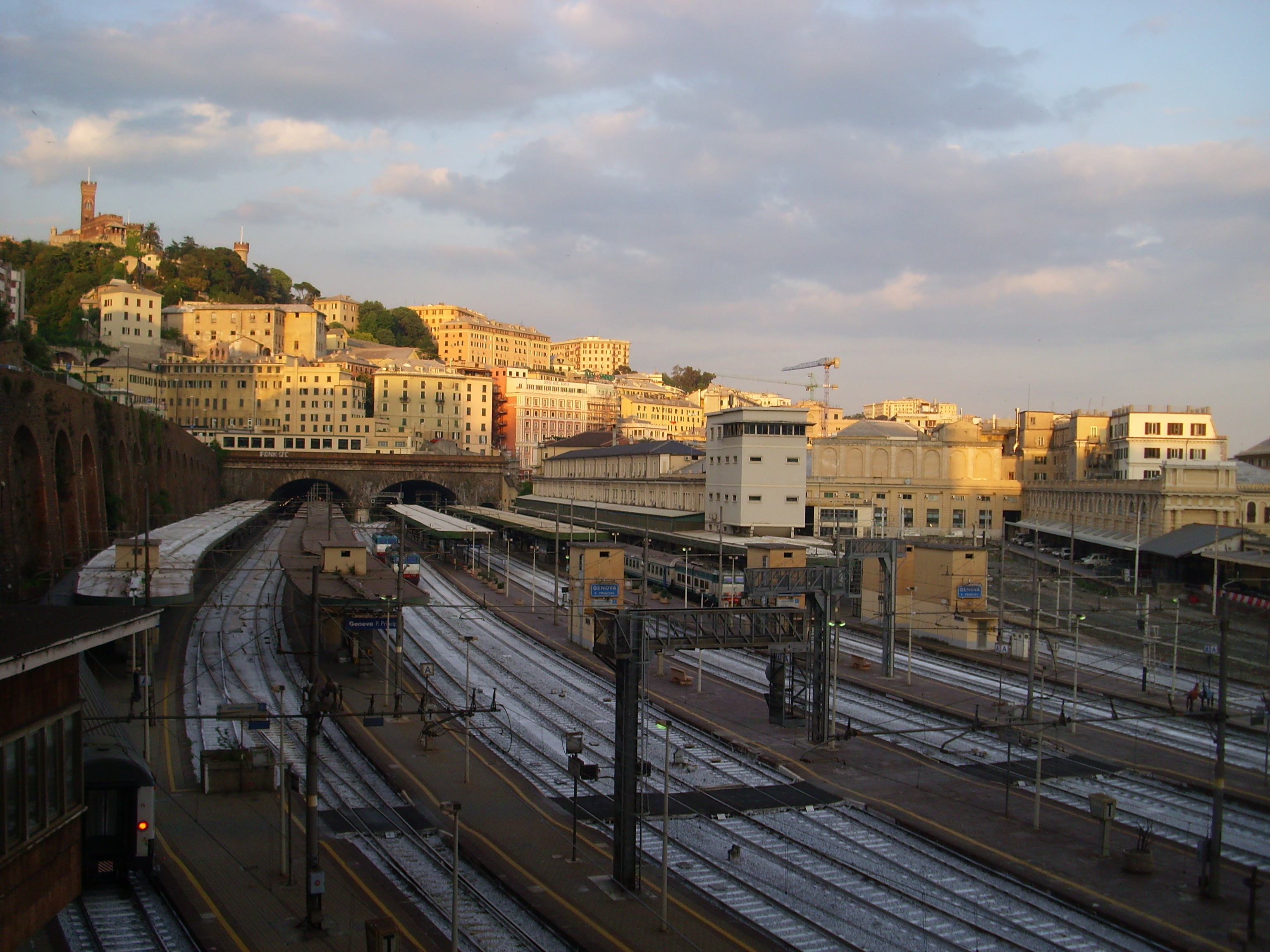 Stazione ferroviaria di Genova Piazza Principe. Sullo sfondo in alto a sinistra si nota il castello d'Albertis.